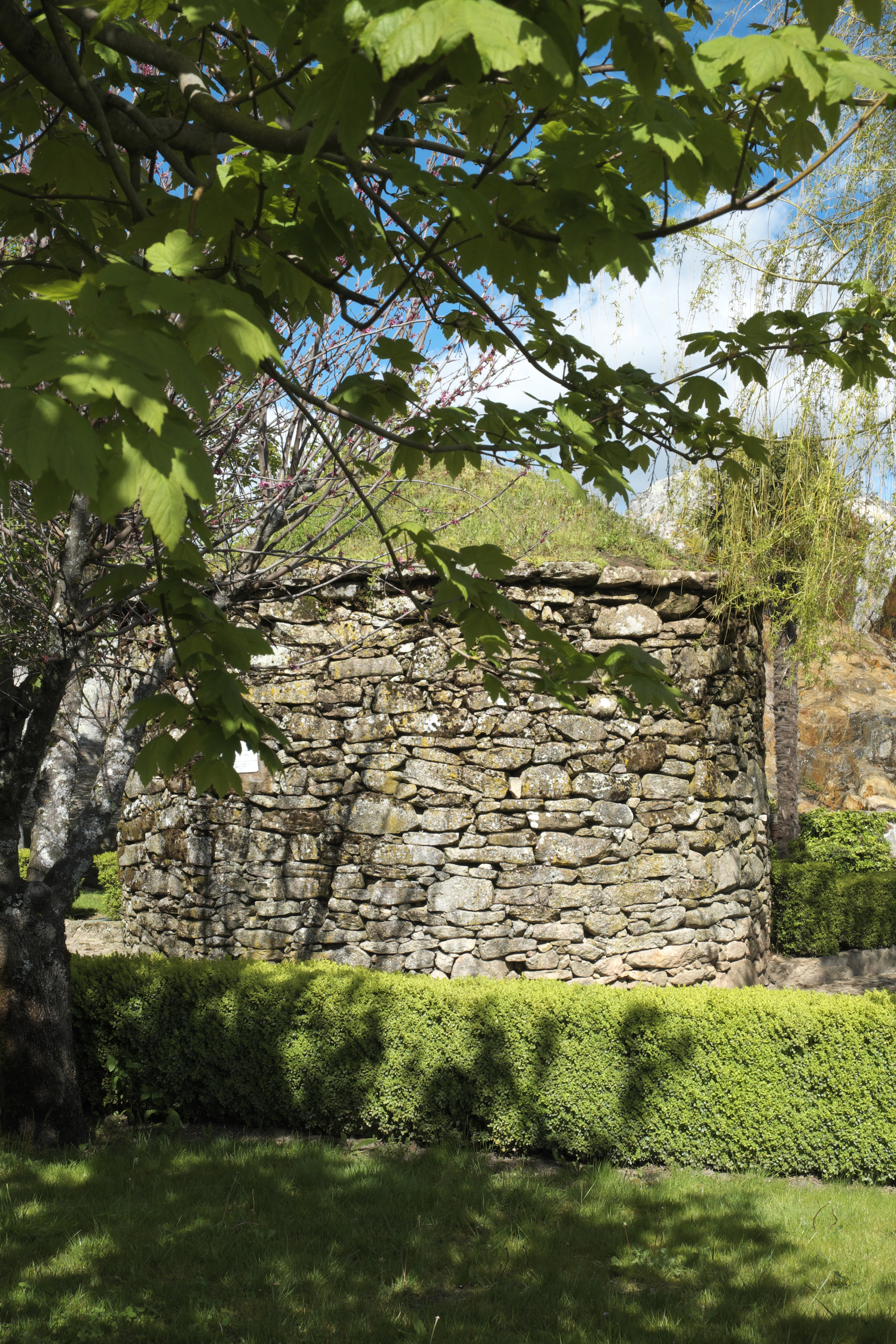 Chafurdão in Marvão, in der Freguesia Santa Maria de Marvão, im Distrikt Portalegre (Portugal), Steinhütte aus Trockenmauerwerk mit falscher Kuppel